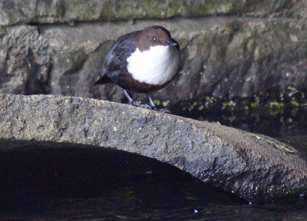 Pluszcz C. c. hibernicus, Irlandia